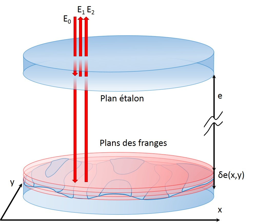 Schéma des franges obtenues dans un interféromètre de Fizeau.